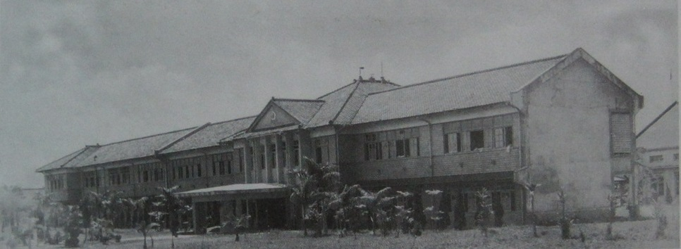 臺灣省立臺中工業職業學校1945年時的景象